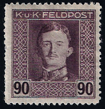 90-Heller-Briefmarke: Kaiser Karl I, Michel-Nr. 68